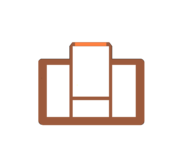 Querschnitt durch ein Erz/Öl-Schiff